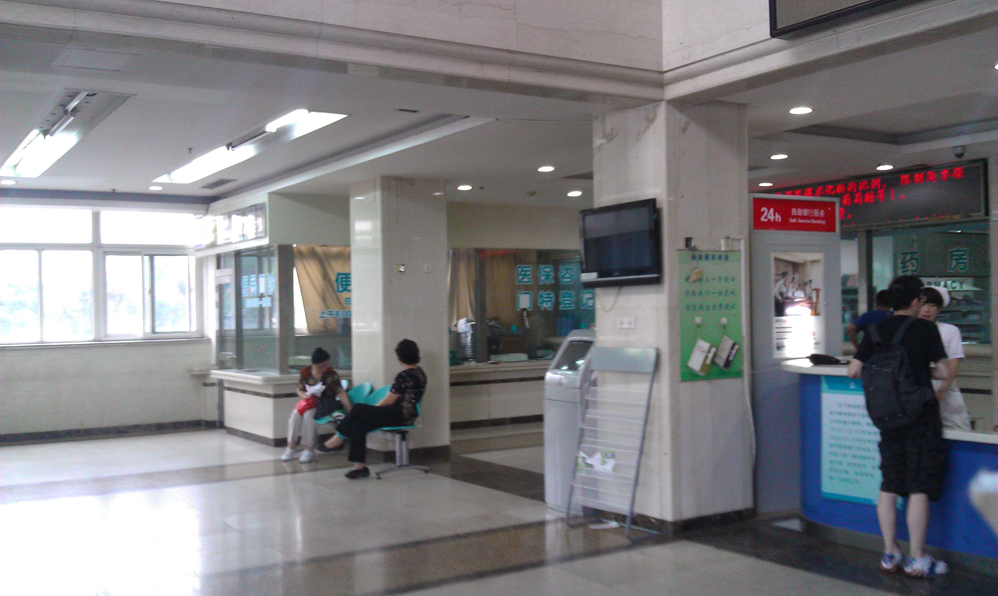 远眺天津第五中心医院